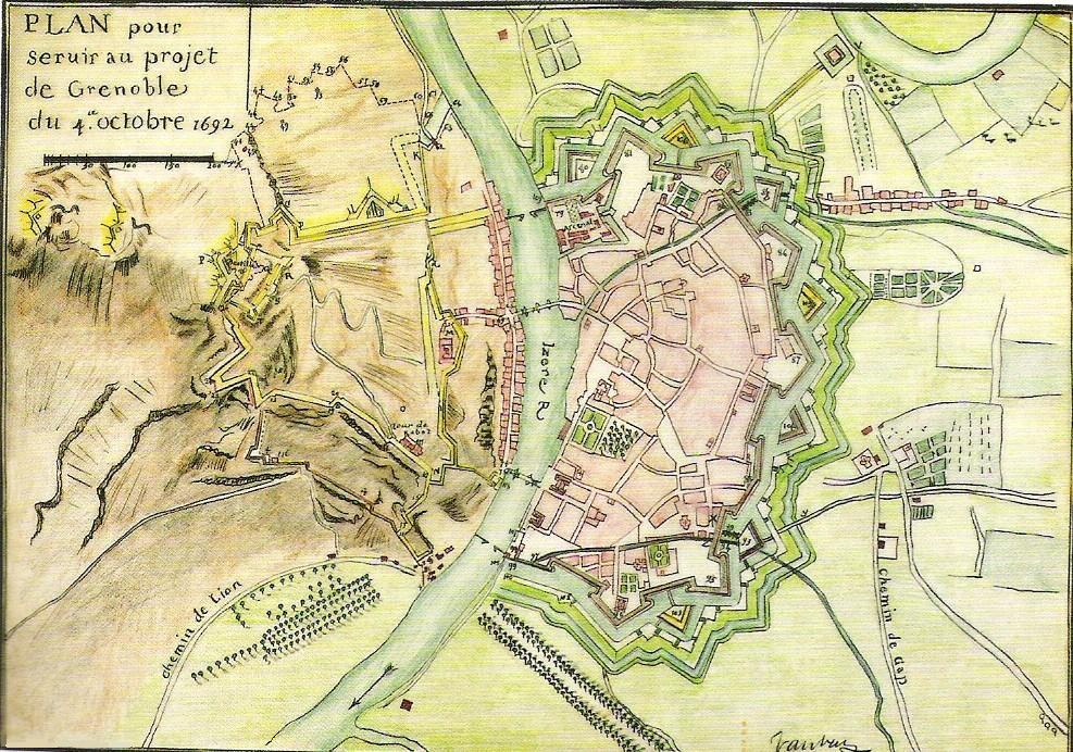 Plan de Grenoble en 1692. Les fortifications sont celles de Lesdiguières achevées en 1606, sauf pour l'extension d'environ 13 hectares achevée par Créqui en 1675, qui apparaît en bas du plan. Les fortifications de la colline de la Bastille sur la gauche ont été faites également par Lesdiguières de 1611 à 1619, elles ont nécessité la création de la porte de France (1620) et de la porte Saint Laurent (1615). Ces deux portes encore existantes aujourd'hui n'ont pas été les premières créées sur la rive droite. Le cours Saint-André (une digue servant encore de protection aux débordements du Drac) est visible en bas, ainsi que les arbres de l'esplanade de la porte de France. Deux faubourgs sont aussi visibles sur la droite, au nord le faubourg Très-Cloitre au-delà de la porte du même nom, et au sud le faubourg Saint-Joseph au-delà de la porte de Bonne. C'est par cette dernière porte que Napoléon rentrera en force à Grenoble le soir du 7 mars 1815. En haut du plan, le carré près de la boucle de l'Isère est probablement l'hôpital des pestiférés avec son cimetière et sa chapelle. Il peut exister des imperfections sur ce plan comme par exemple l'absence de la maison de Guy Pape au-dessus de l'Esplanade.